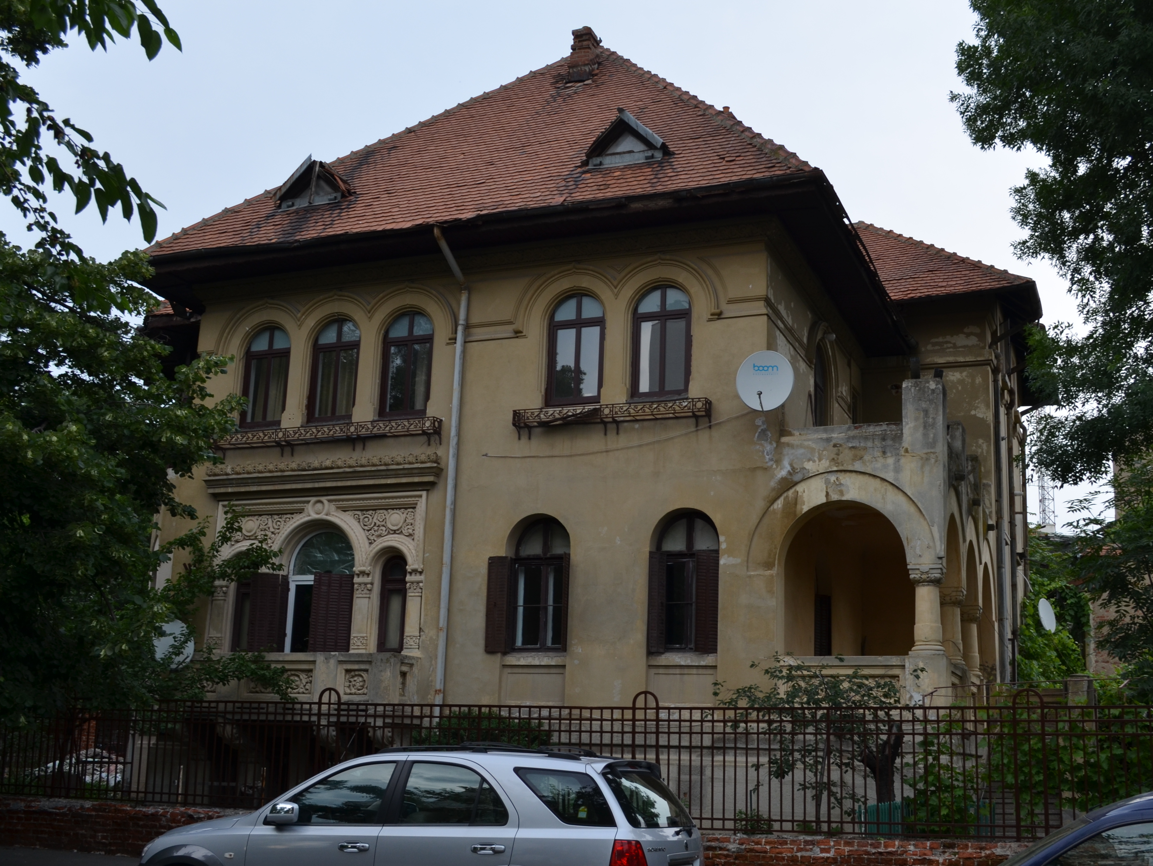 Casă, Aleea Modrogan nr. 6 (vedere din Str. Tirana)